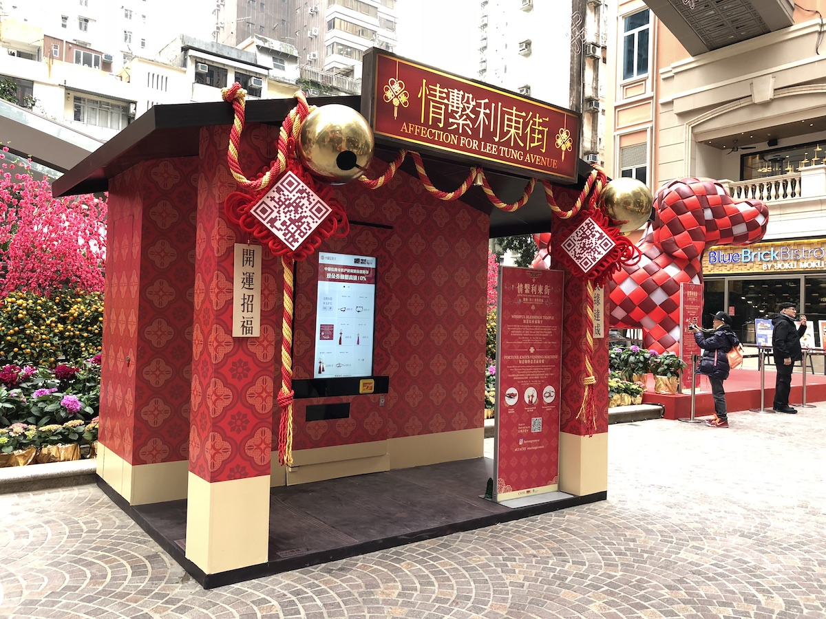 在利東街節日活動出現的 Gritus 智能售賣機。